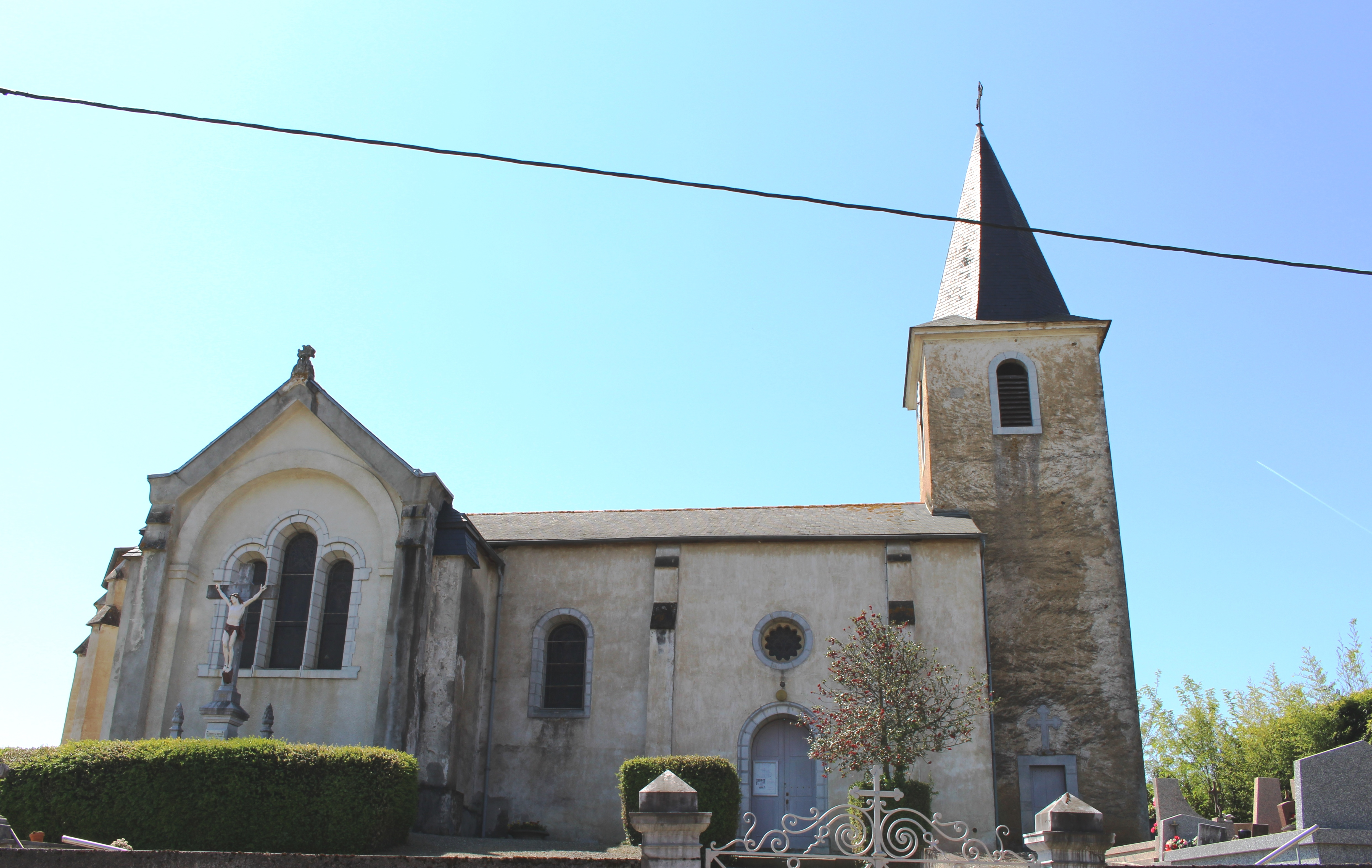 Église Saint-Barthélemy de Souyeaux (Hautes-Pyrénées)